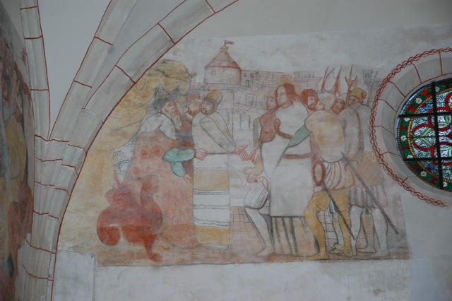 Peinture murale eglise de Vault de Lugny